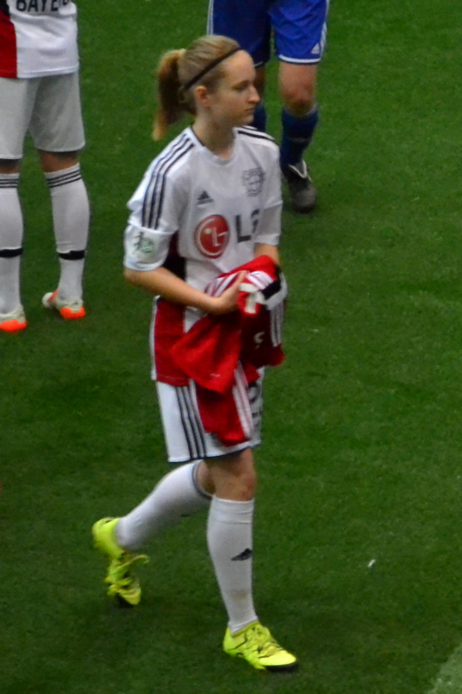 Frauke Roenneke (Bayer Leverkusen) beim SAP Frauen-FußballCup 2016